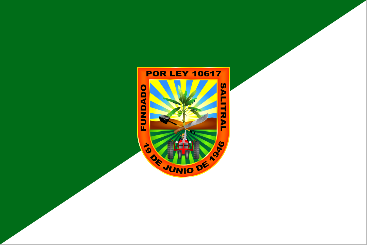 Distrito de Salitral - Provincia de Sullana - Región Piura